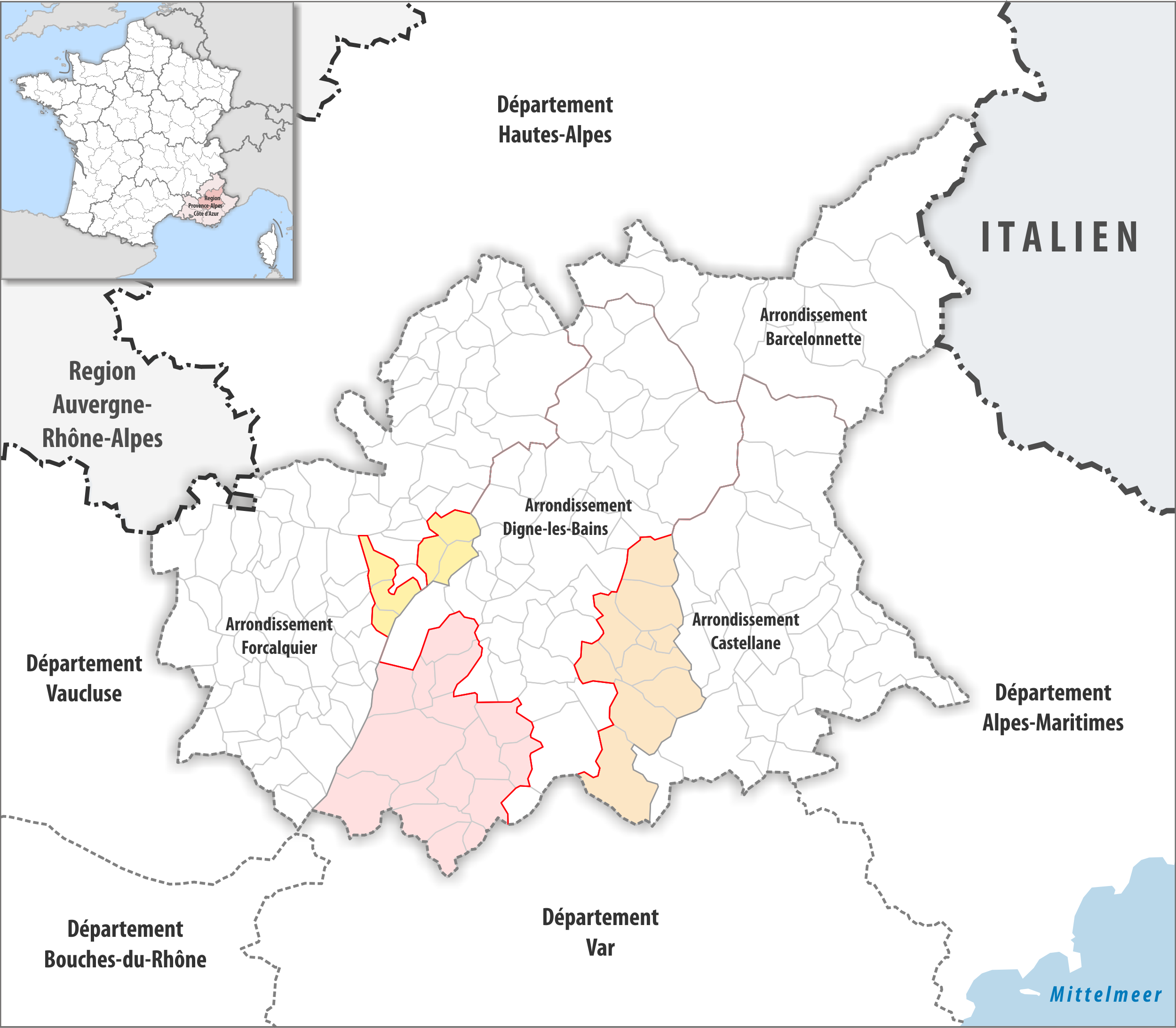 Arrondissements Anpassungen auf 2017 im Departement Alpes-de-Haute-Provence